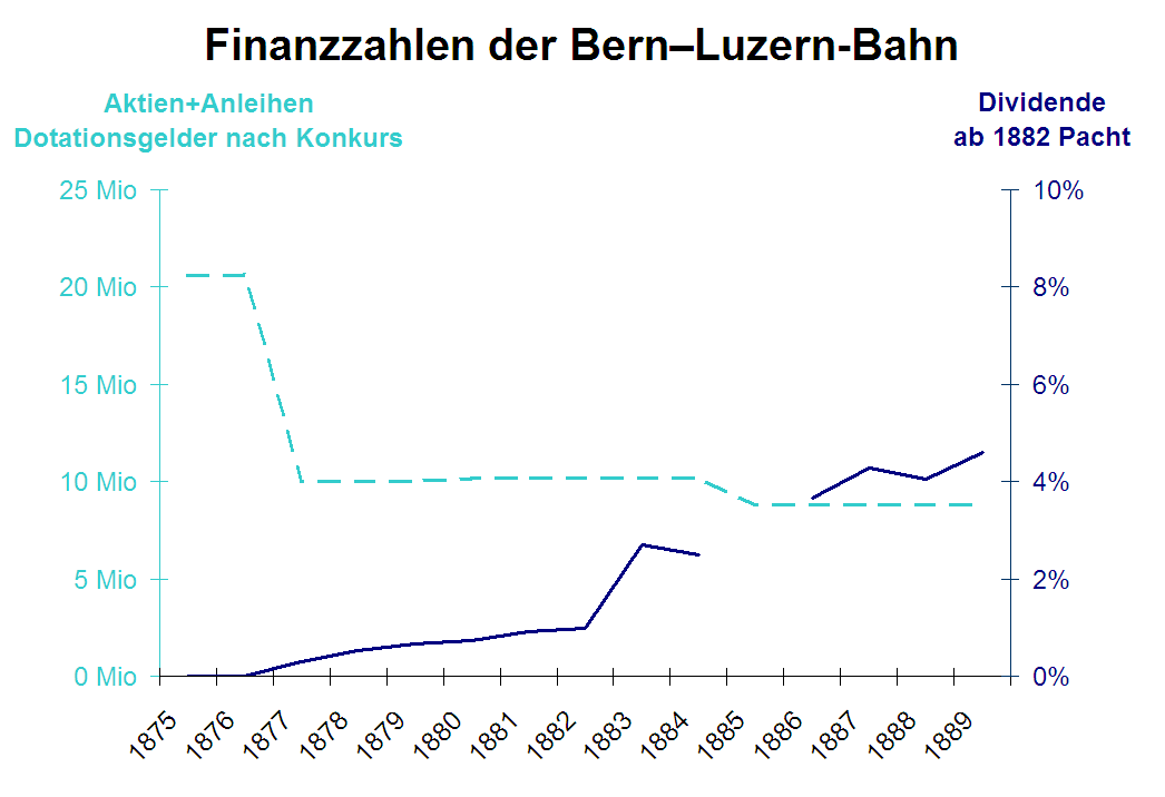 Aktienkapital und feste Anleihen sowie Dividende Aktien sind Anteile am Grundkapital des als Aktiengesellschaft konstituierten Bahnunternehmens. Sie sind hier im Nennwert angegeben, der jedoch in keiner Weise dem Kurswert entsprechen muss. Viele Bahnen haben im Laufe der Zeit ihr Aktienkapital erhöht, was gewöhnlich auf eine Expansion der Bahn hindeutet. Eine Verminderung des Aktienkapitals wurde bei finanziellen Schwierigkeiten vorgenommen, indem durch Herabsetzung des Nennwerts der Aktien Kapital für das Unternehmen freigesetzt wurde (sogenannter Kapitalschnitt). Dotationsgelder der öffentlichen Hand, beispielsweise bei Aufkauf nach Konkurs, werden hier ebenfalls dargestellt. Feste Anleihen waren neben Aktien die wichtigste Form der Geldbeschaffung für die Bahnen. Das vom Unternehmen aufgenommene Kapital wird über eine bestimmte Laufzeit zu einem bestimmten Zinssatz verzinst. Die Zinslast für Anleihen war ein gewichtiger Ausgabeposten insbesondere der grossen Bahnen. Wenn wegen zu geringen Erträgen die Zinsen nicht mehr bezahlt werden können, droht der Konkurs. Die Dividendenauszahlungen für die Aktionäre sind hier im Verhältnis zum Nennwert der Aktien angegeben. Vermerkt sind auch die Erträge aus Dotationskapitalien, die bei der Bern–Luzern-Bahn in Form von Pachtzinsen ausbezahlt wurden. Über die Höhe der Pachtzinsen im Jahr 1885 sind aufgrund der Quellenlage keine Angaben vorhanden.